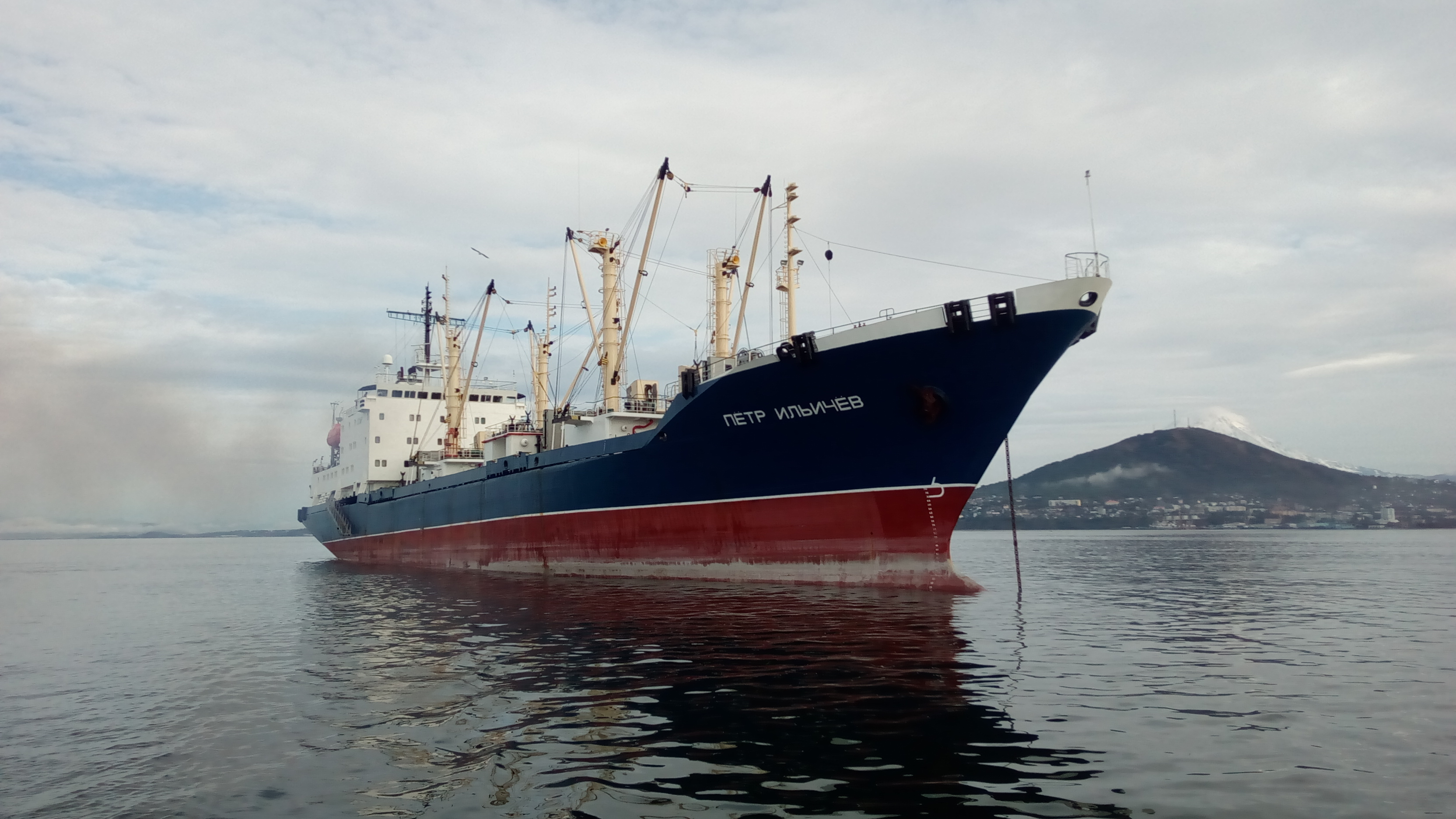 Траулер-рефрижератор "Пётр Ильичёв"